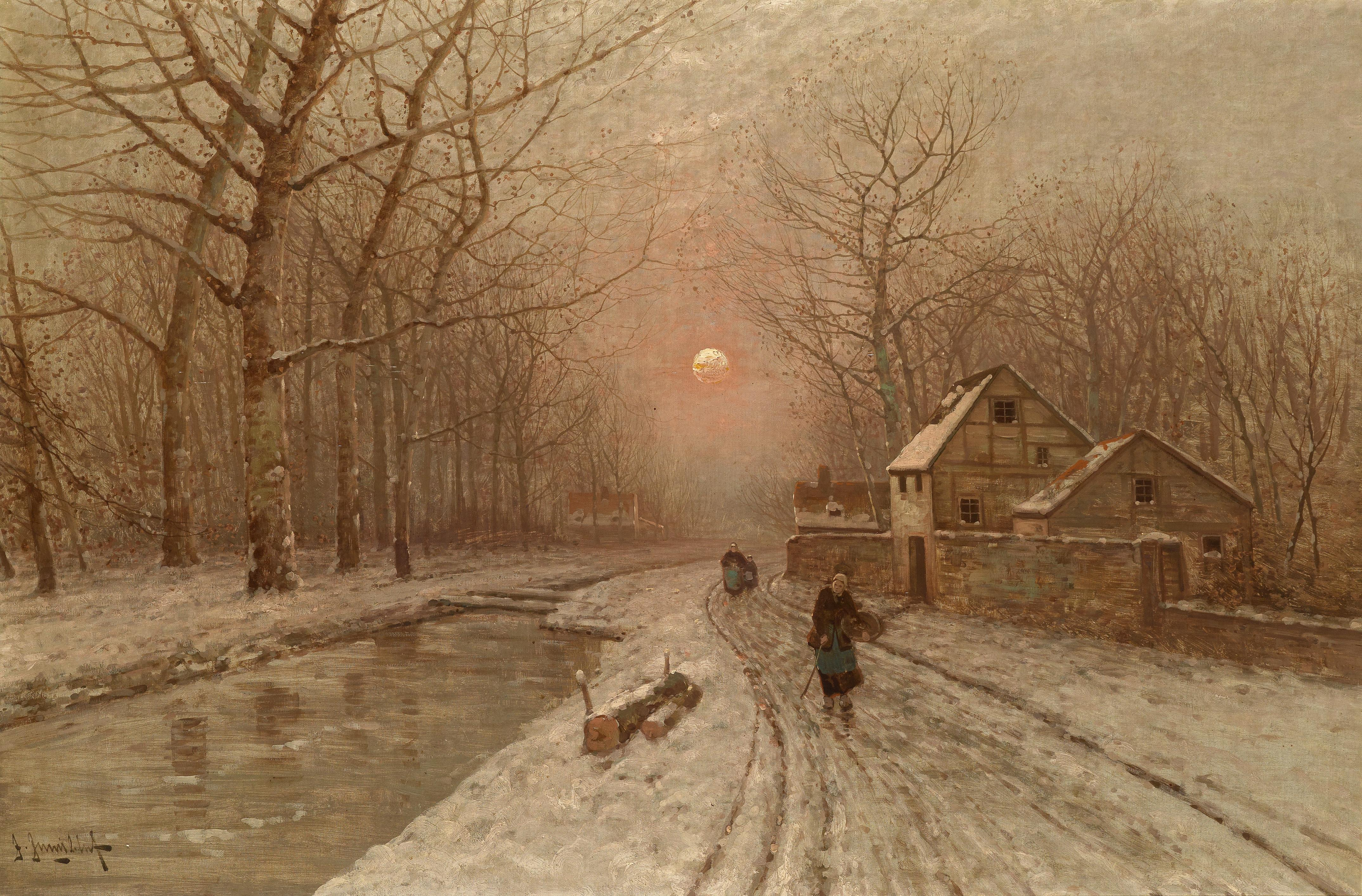 Abendstimmung über einer Dorfstraße, signiert J. Jungblut, Öl auf Leinwand auf Platte, 83 x 123 cm